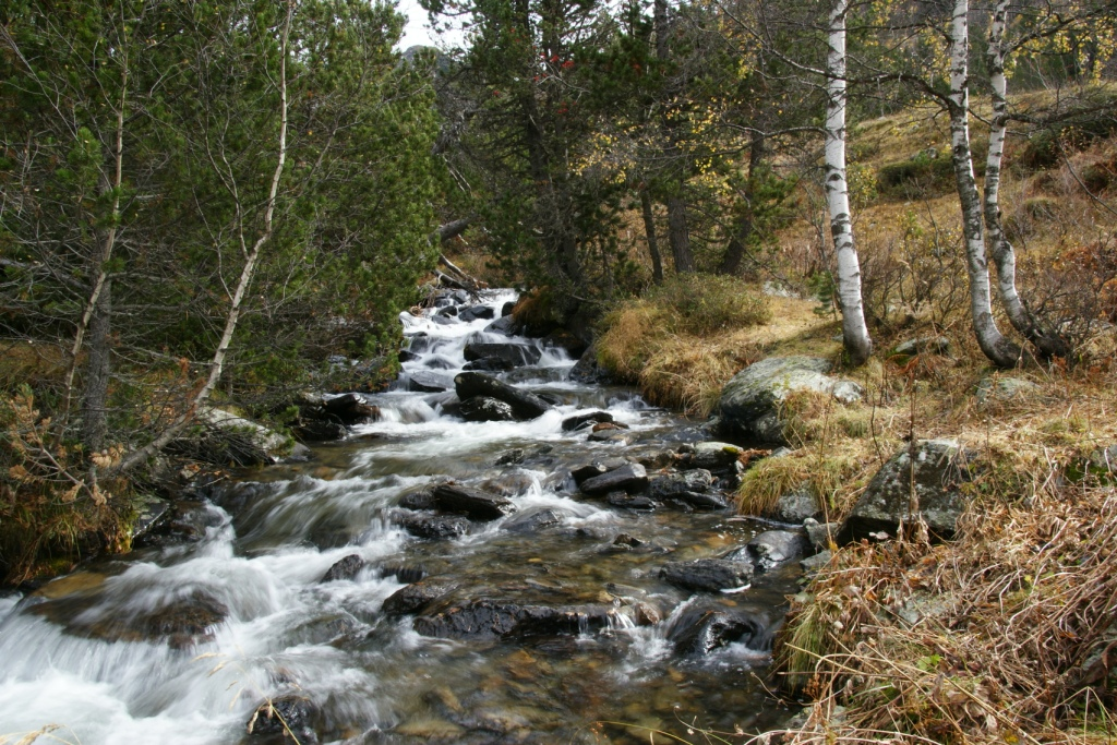 Riu de Sorteny This is a a photo of a river in Andorra with id: IEA-R-49